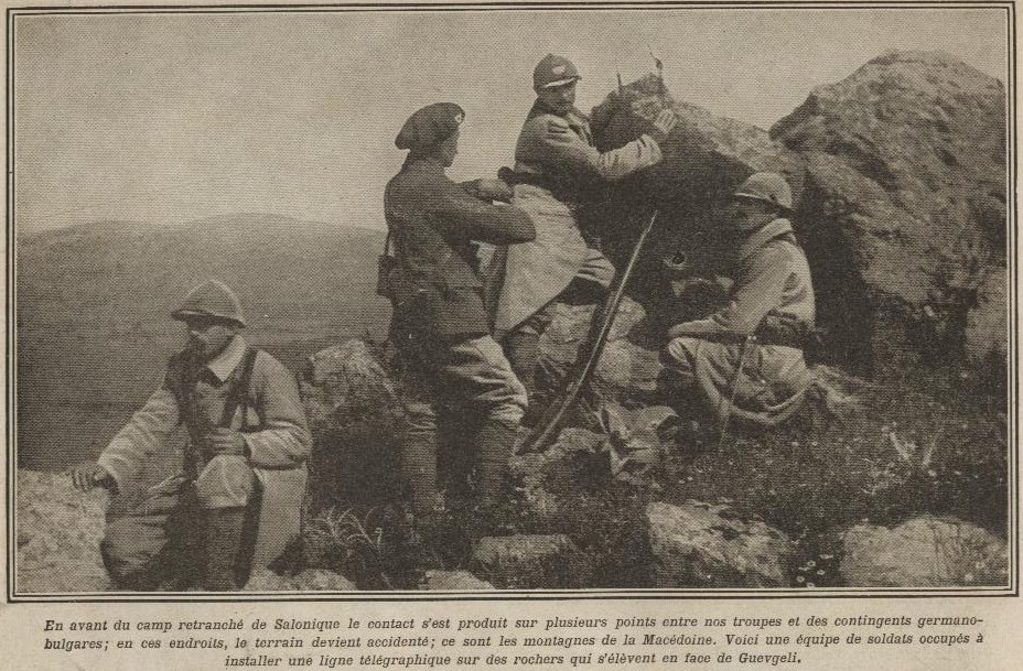 Les troupes françaises installant une ligne téléphonique en Macédoine, prés de Guevgueli.